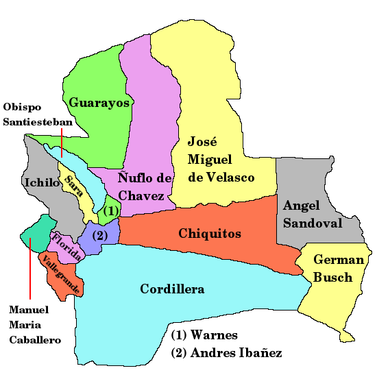 Carte du département de Santa Cruz en Bolivie